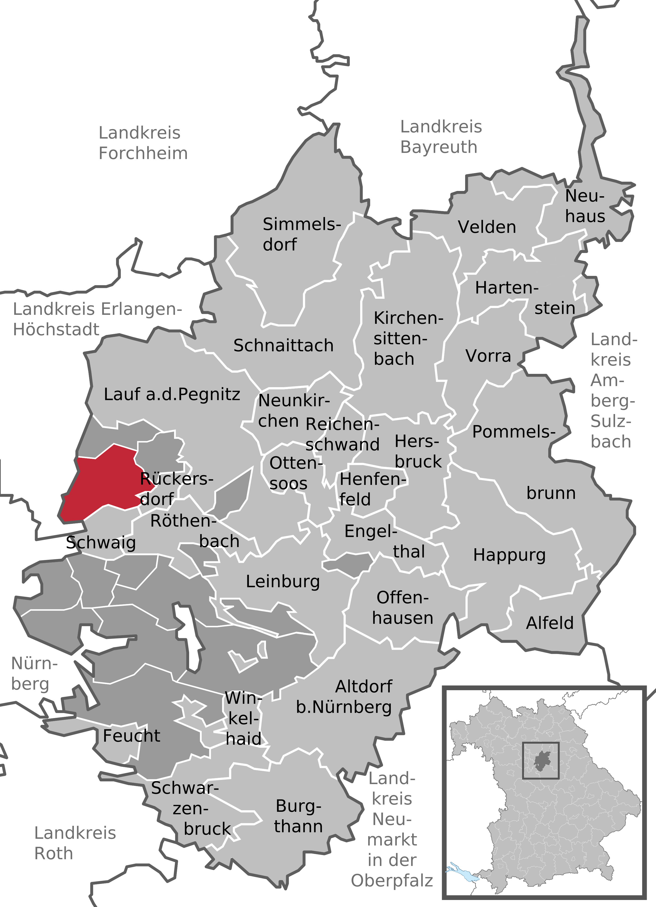 Positionskarte des gemeindefreien Gebietes Behringersdorfer Forst